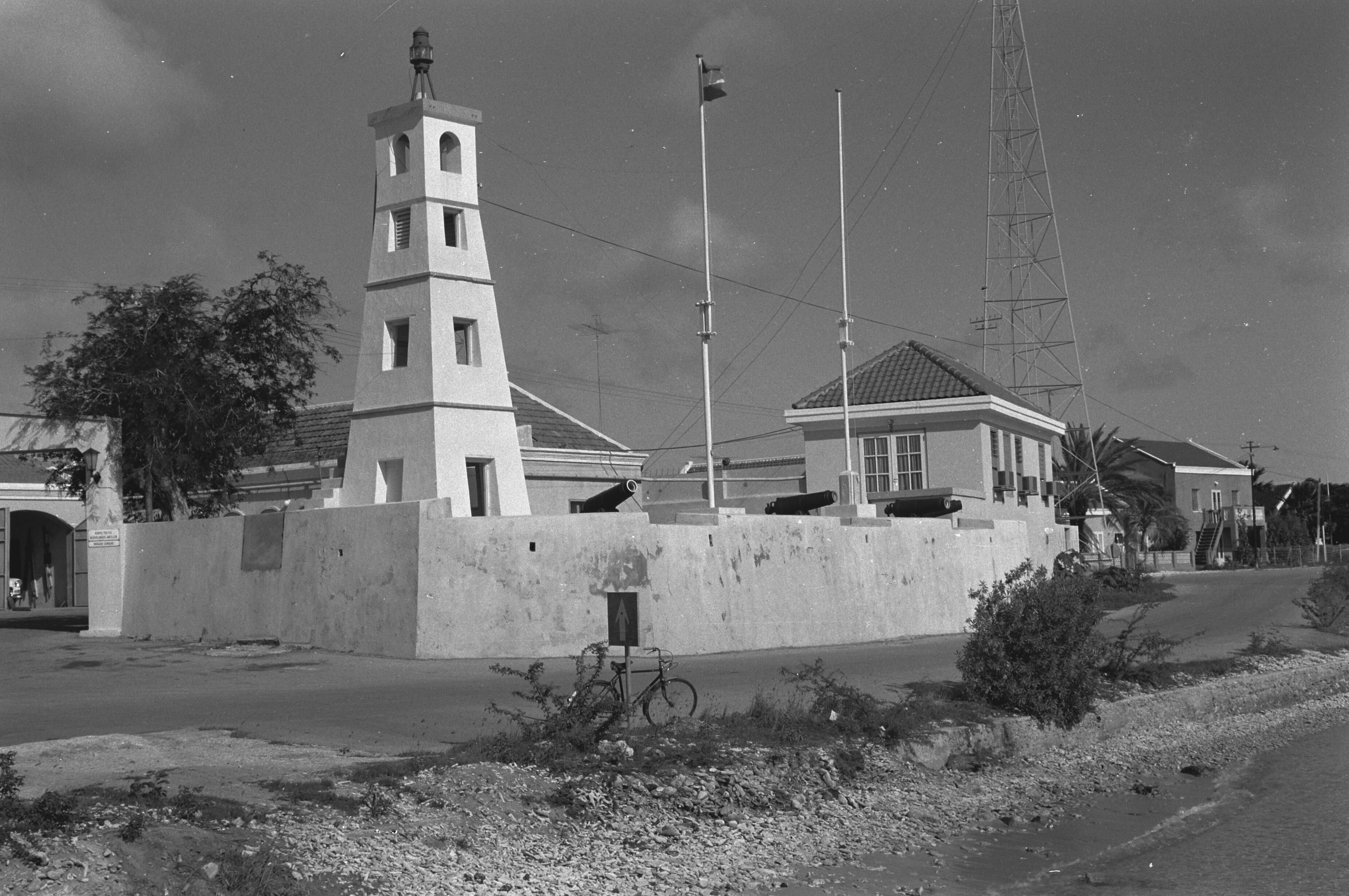 Fort en vuurtoren, zeezijdeOnderwerp: vuurtorens, forten